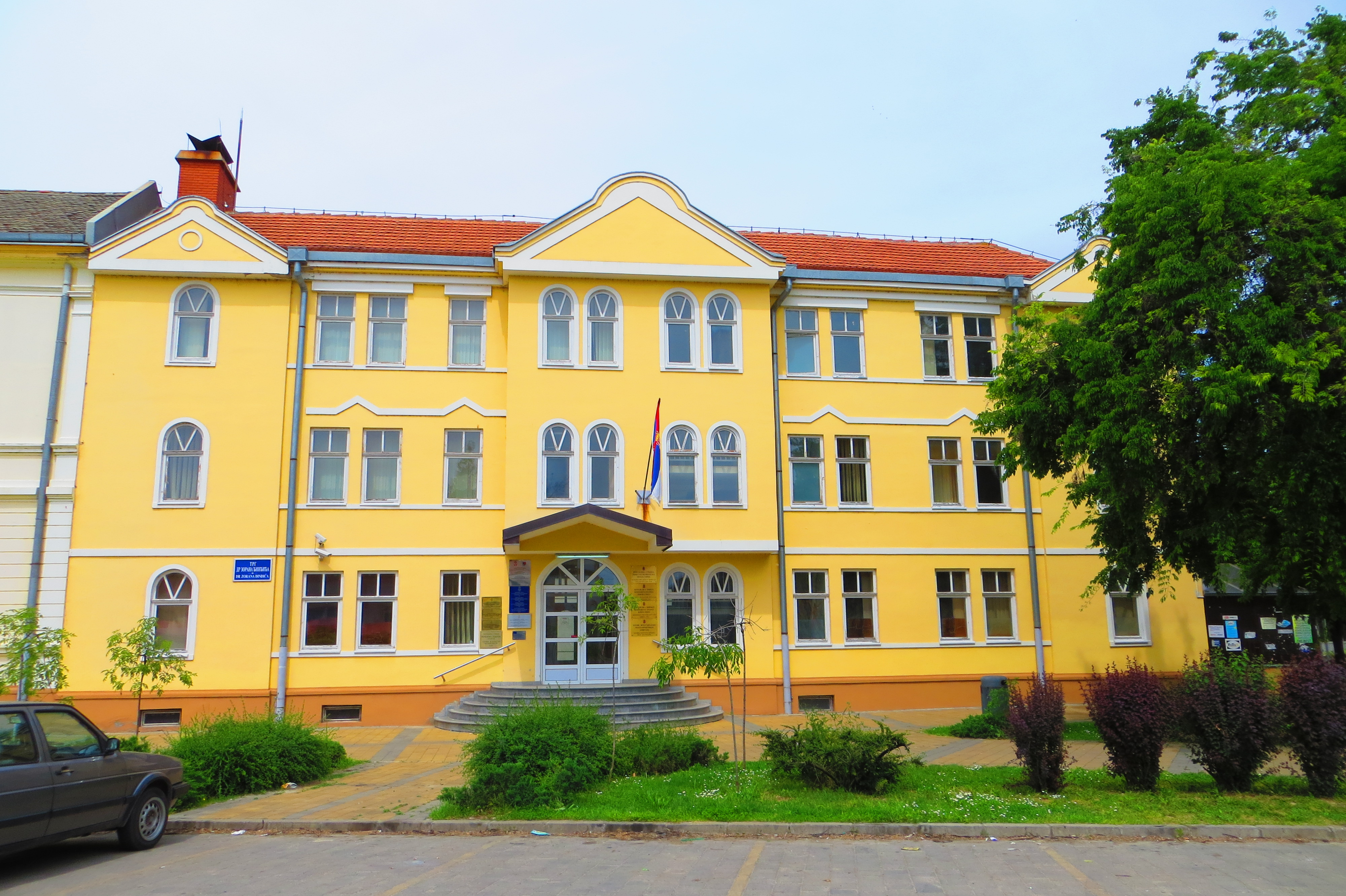 Zmaj Jovina